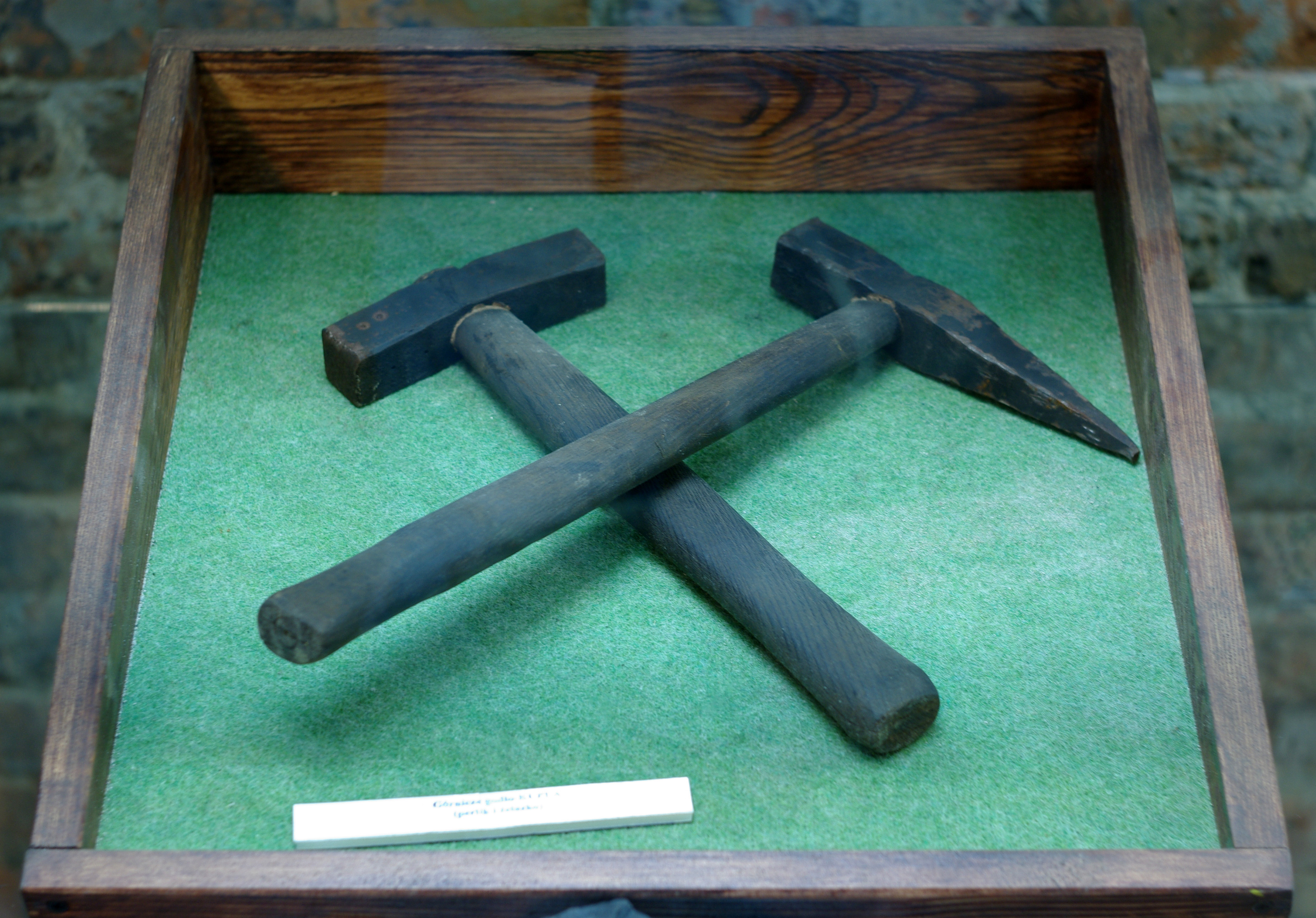 Godło górnicze - perlik(pod spodem) i żelazko(na wierzchu)